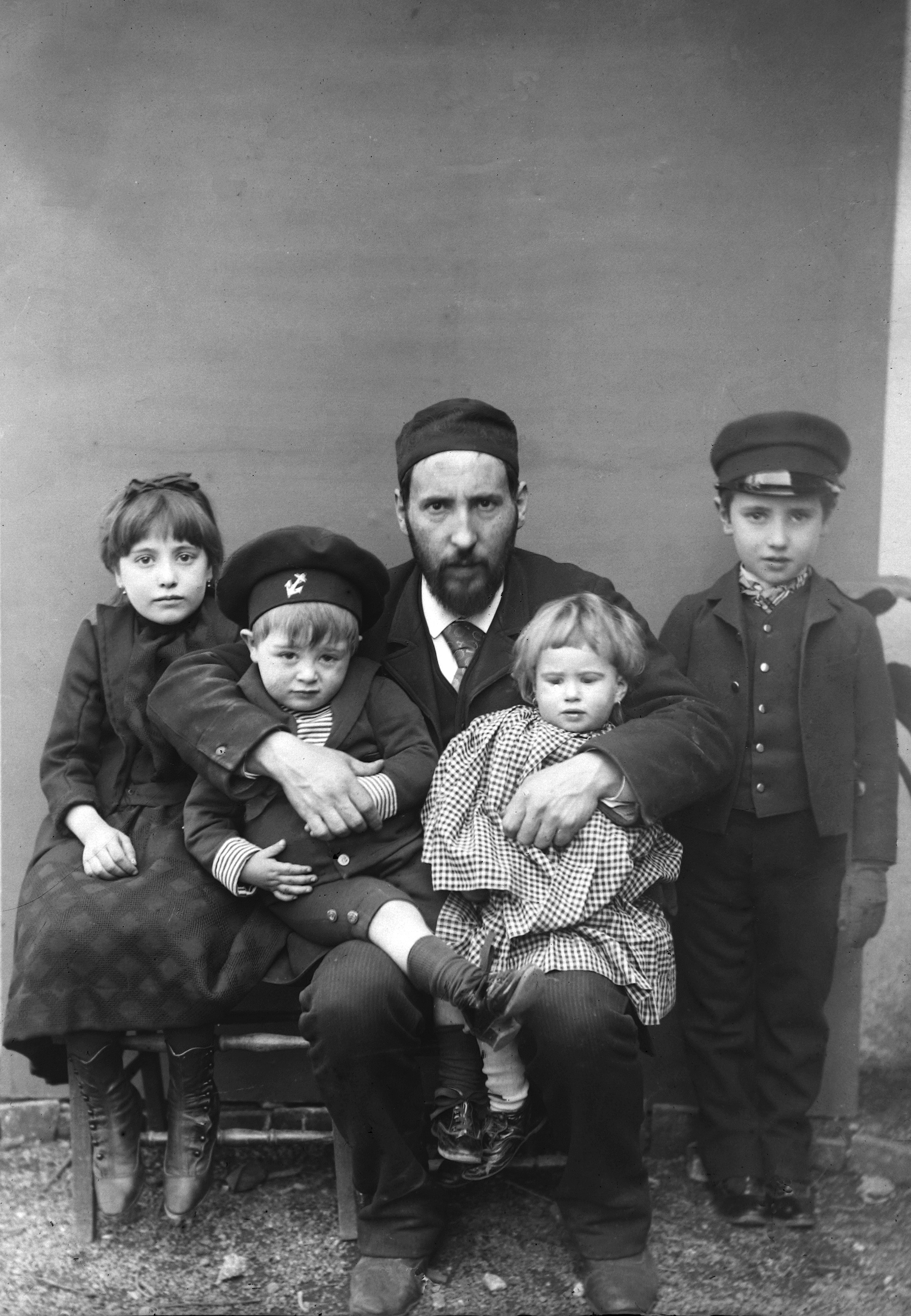 Ramón y Cajal con sus hijos: Fe, Santiago, Jorge y Paula, en Barcelona (1889). Autorretrato.